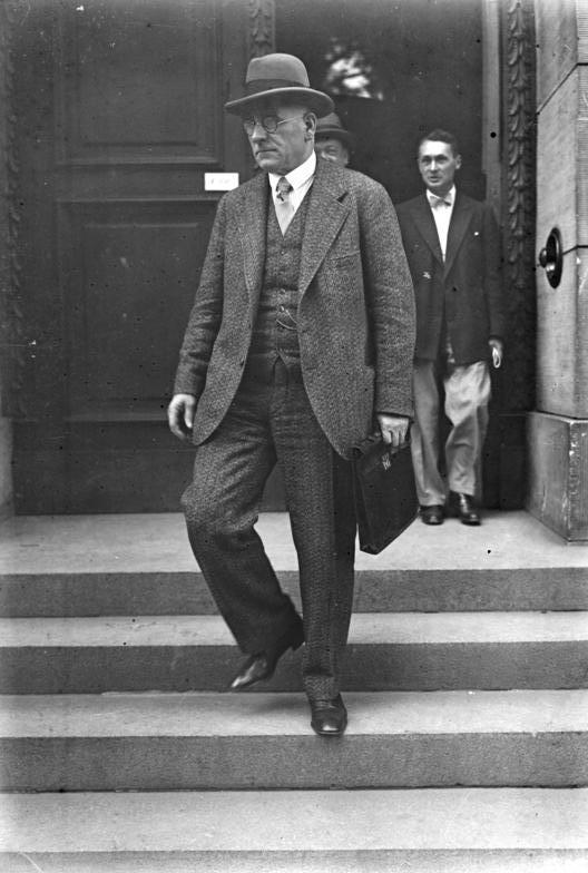 Der deutsche Reichstag aufgelöst! Momentaufnahmen vor dem Reichstag am Tage der Auflösung am 18. Juli mittag 1 Uhr! - Der preussische Ministerpräsident Dr. Braun verlässt den Reichstag nach der Auflösung.